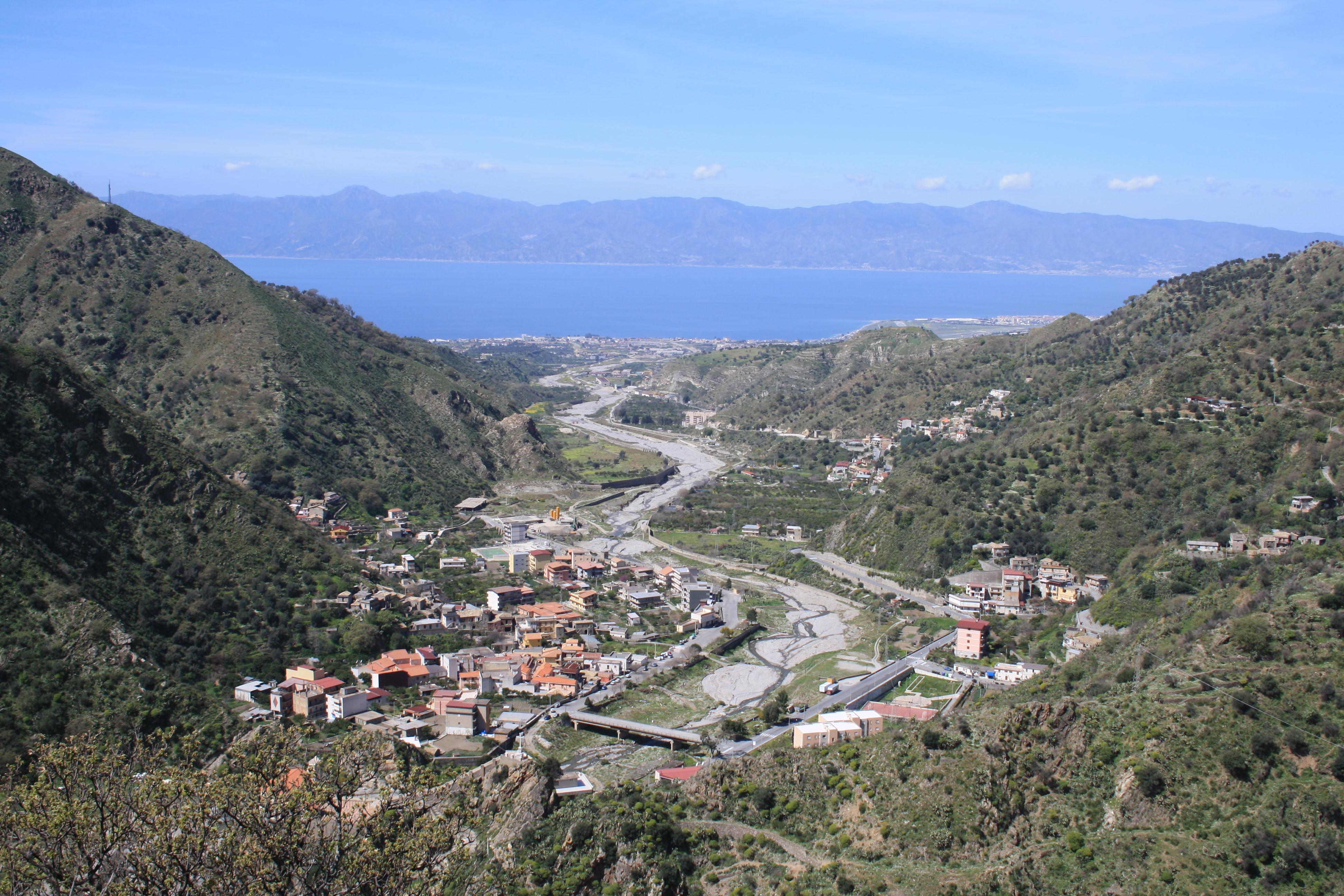 Veduta della fiumara e della Vallata del Valanidi. Foto scattata da Allai, frazione del comune di Motta San Giovanni.